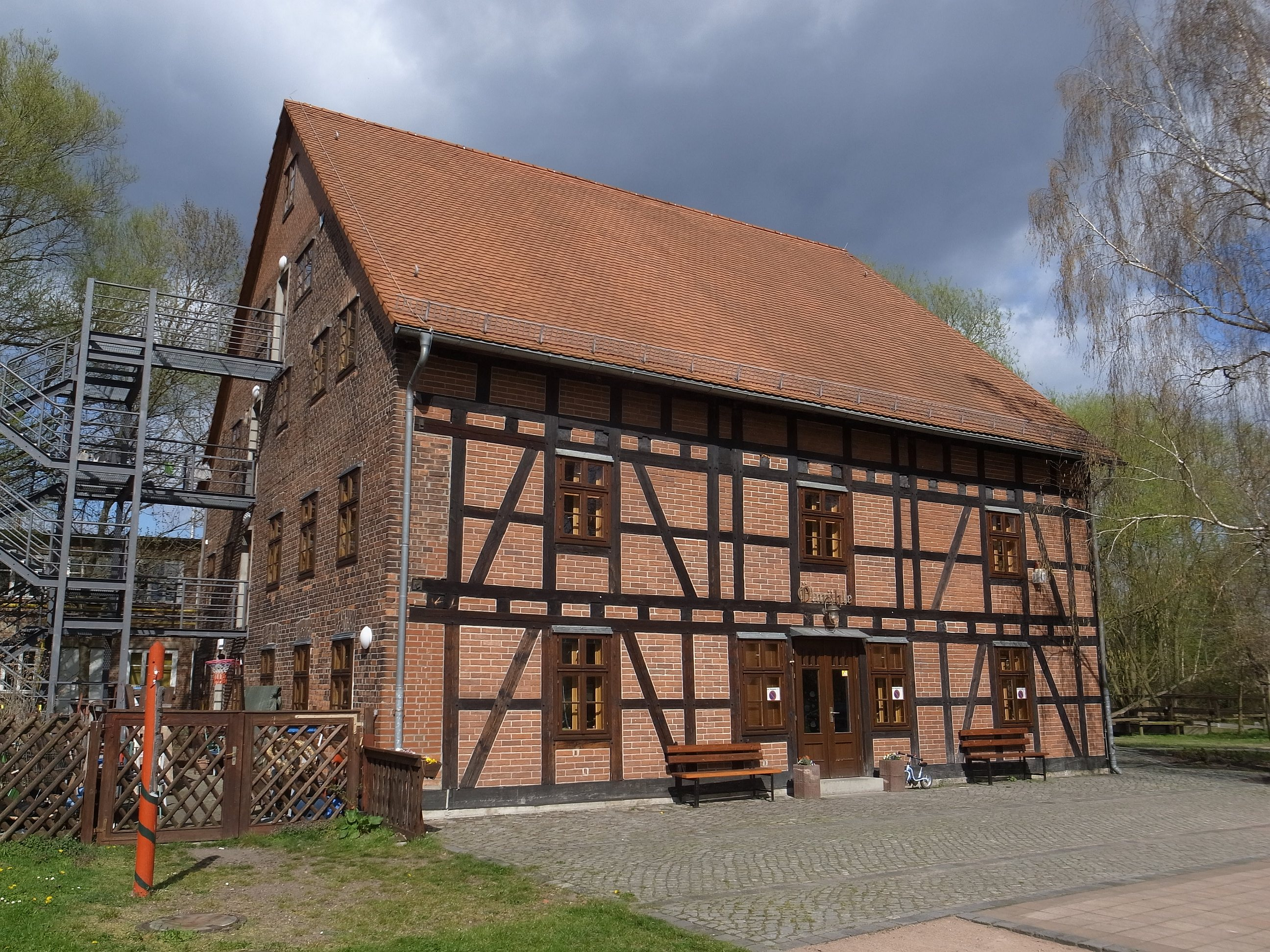 Dessau-Roßlau, Hauptstraße 108a, Ölmühle. (Baudenkmal im Denkmalverzeichniss Sachsen-Anhalt, Erfassungsnummer: 094 41066 000 000 000 000 [1]) Homepage: Ölmühle in Roßlau - Mehrgenerationenhaus, soziokulturelles Zentrum und Kulturhaus